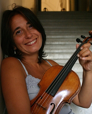 Sonig Tchakerian